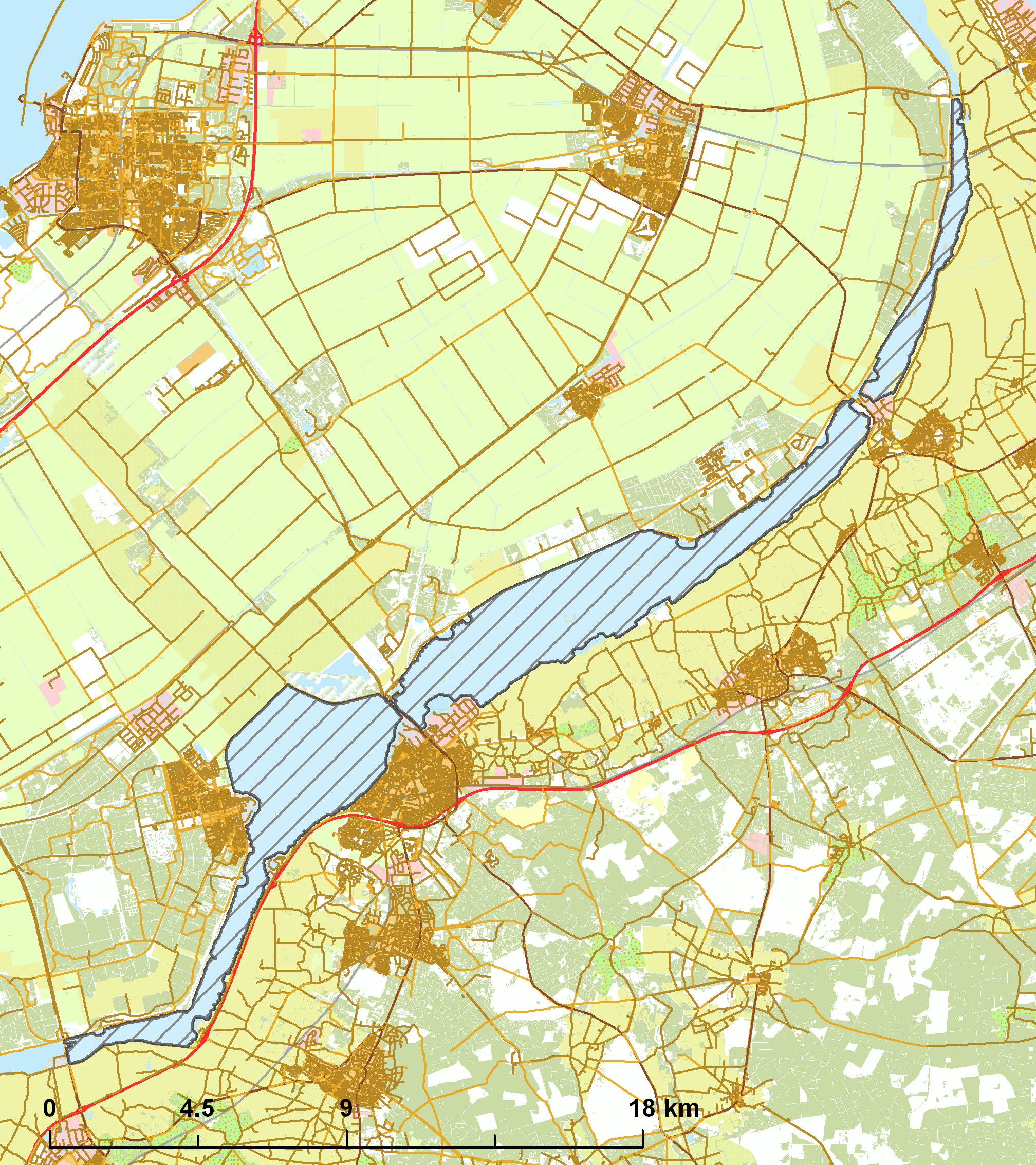 Natura2000 - Veluwerandmeren.png